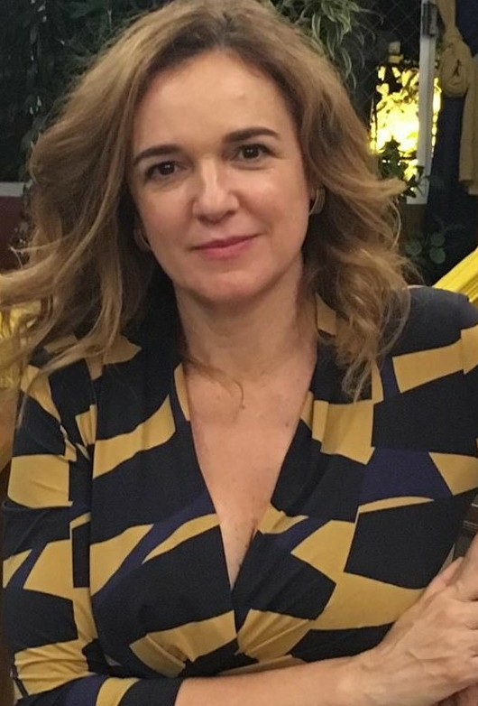 Atriz